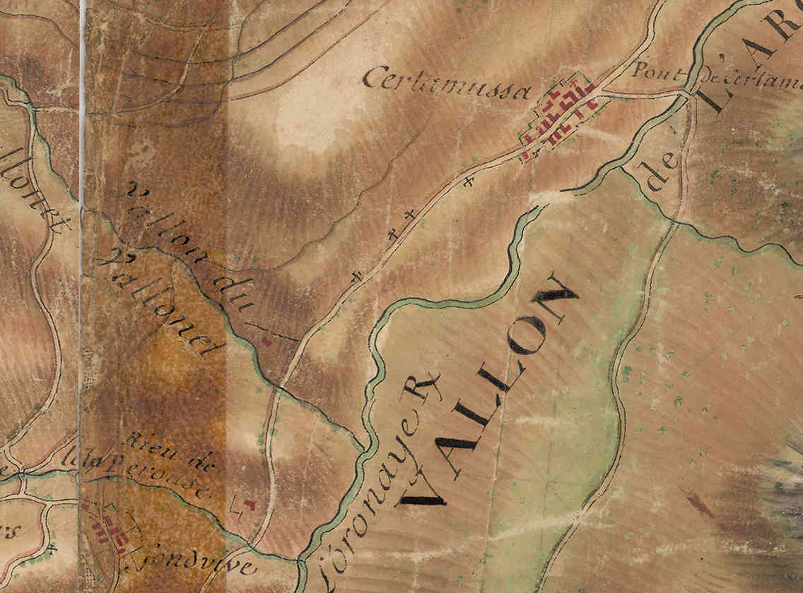 carte de Bourcet numérisé Paris, Nicolas-Alexandre et Olivier-Joseph, Extrait réduc JPG 30% Antoine-H